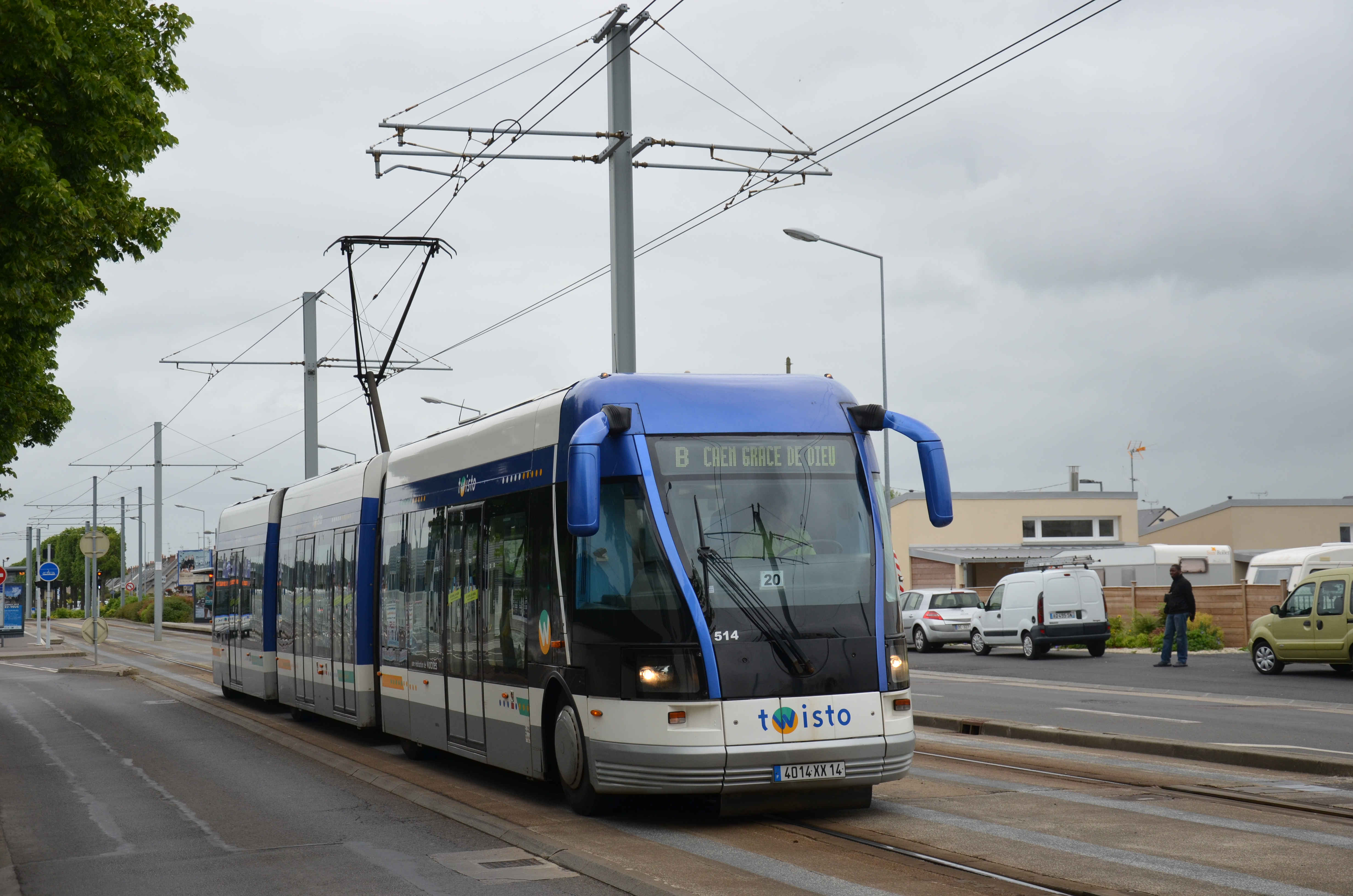 Bombardier TVR n°514 sur la ligne B du réseau Twisto de Caen, quittant la station Poincaré.